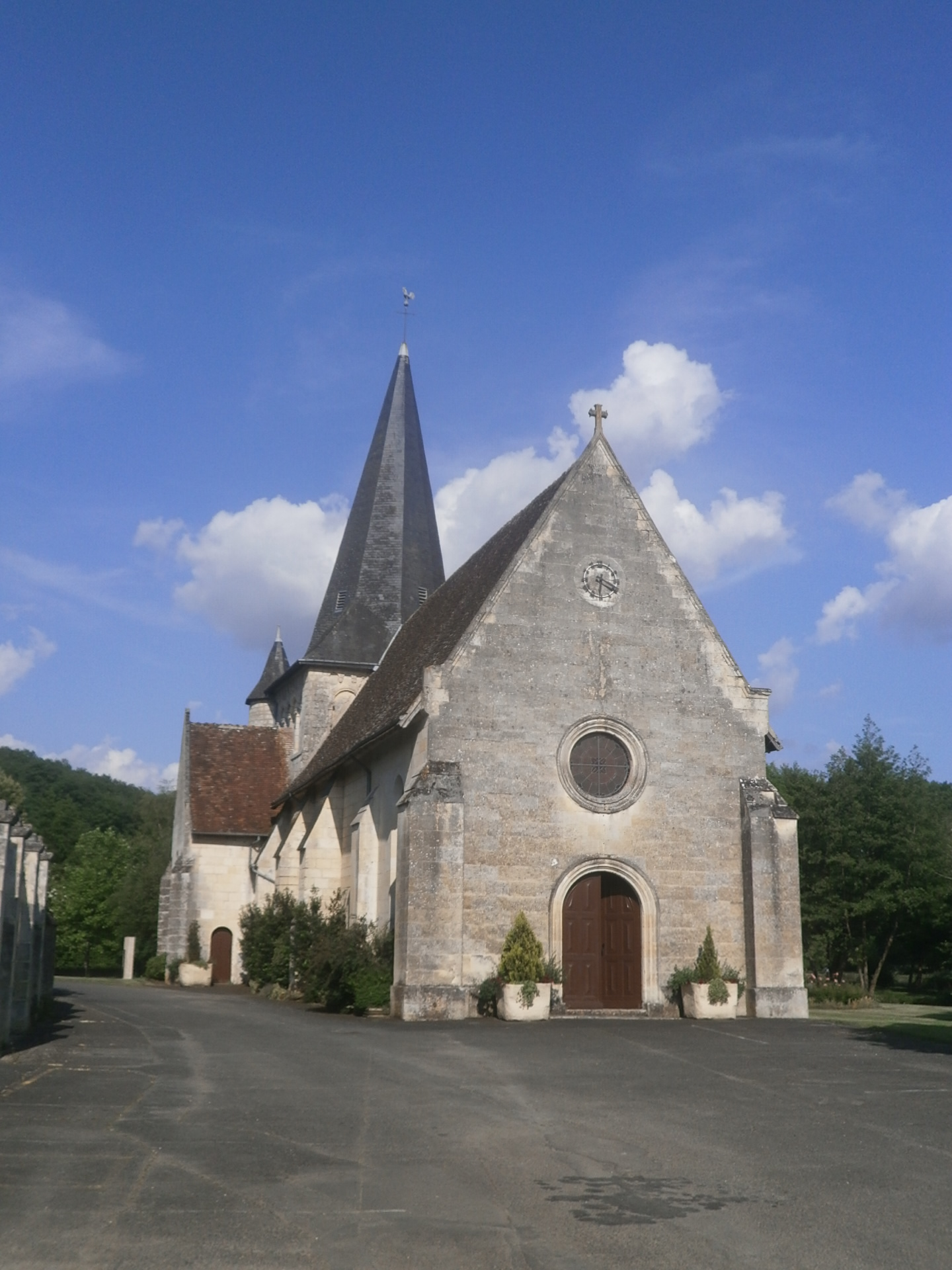 L'église du Petit-Pressigny